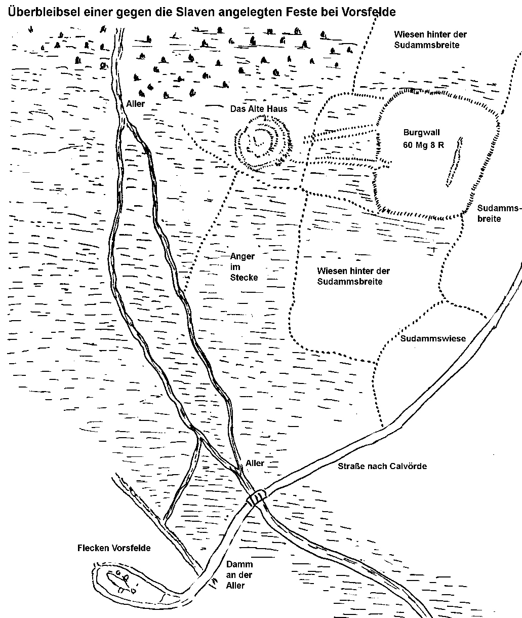 Burgwall Vorsfelde in Bodes Collectaneen Bd 70